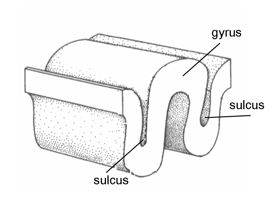 gyrus en sulci